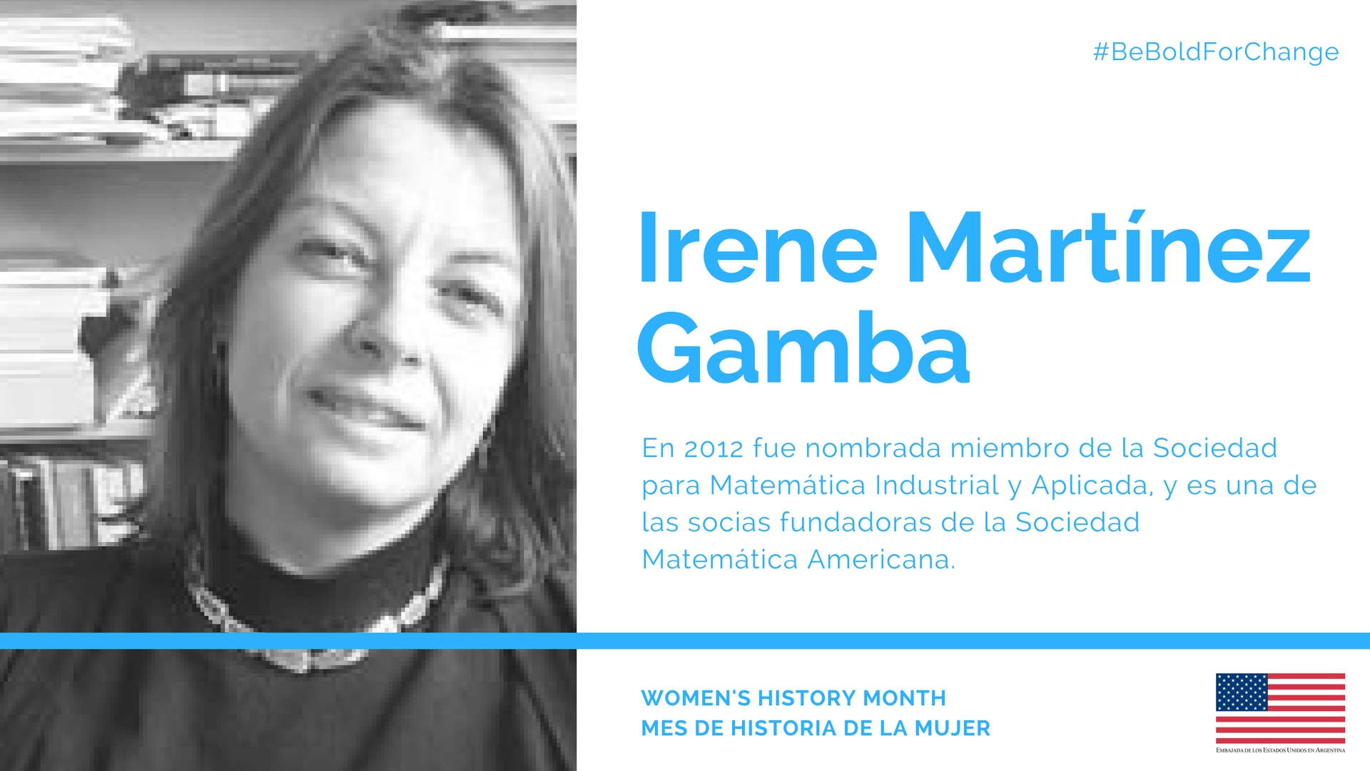 Irene Martínez Gamba.